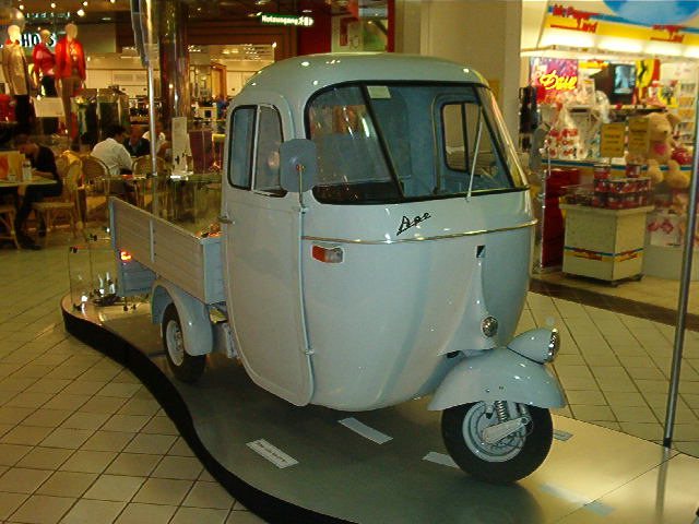 Ape AC4